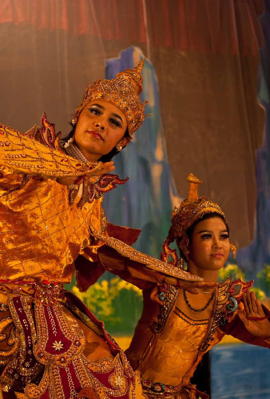 Burmese Ramayana dance (Rama and Me Thida) at the Karaweik in Yangon